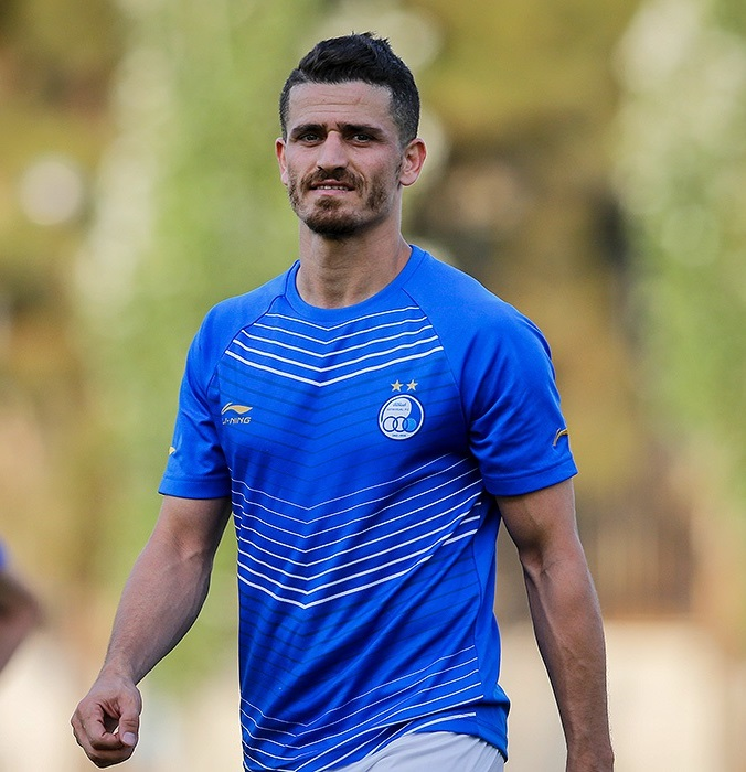 وریا غقوری